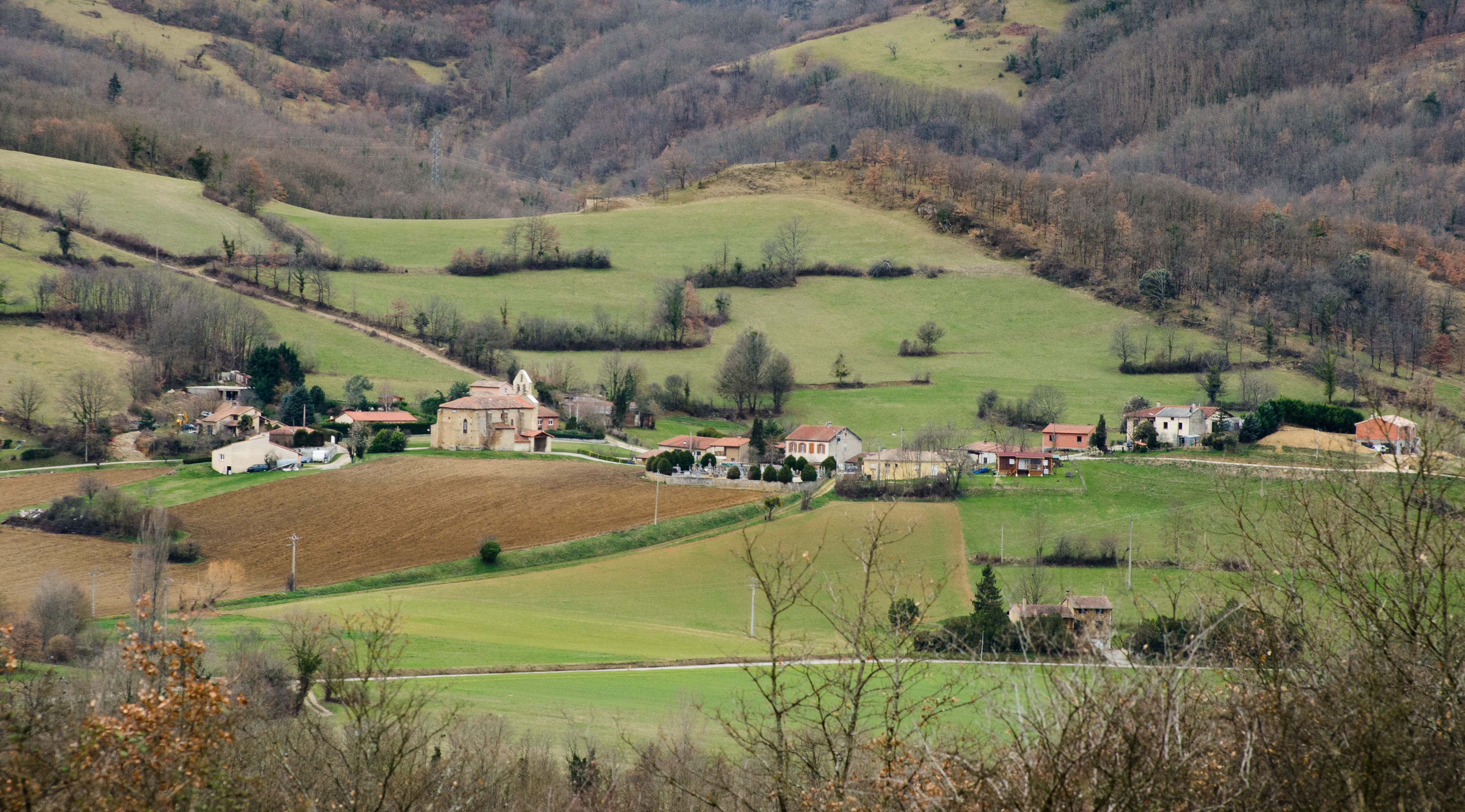 Ségura vu des coteaux